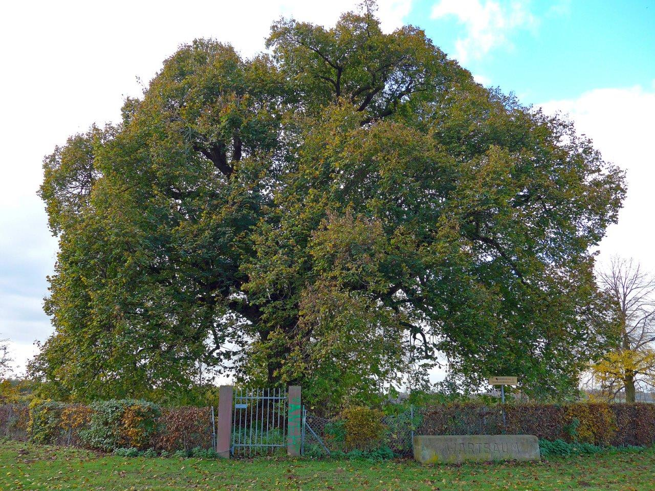 Wartbaum aus Richtung Osten mit Sandsteintafel